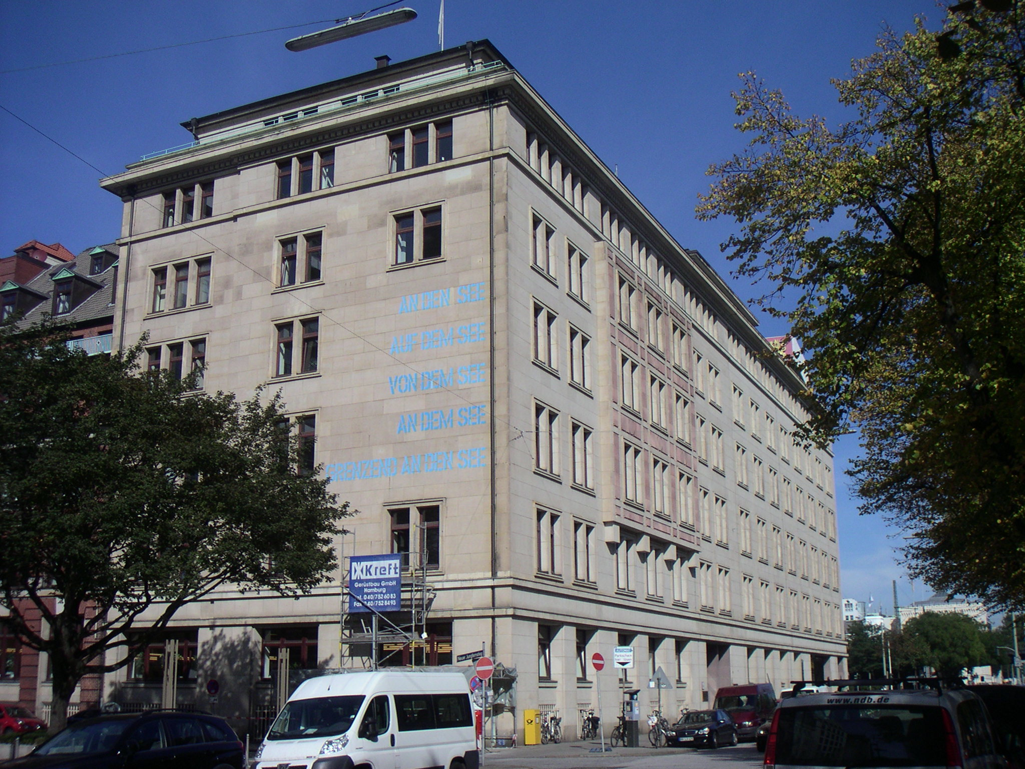 Ehemaliges Esso-Haus, Neuer JungfernstiegThis is a photograph of an architectural monument.